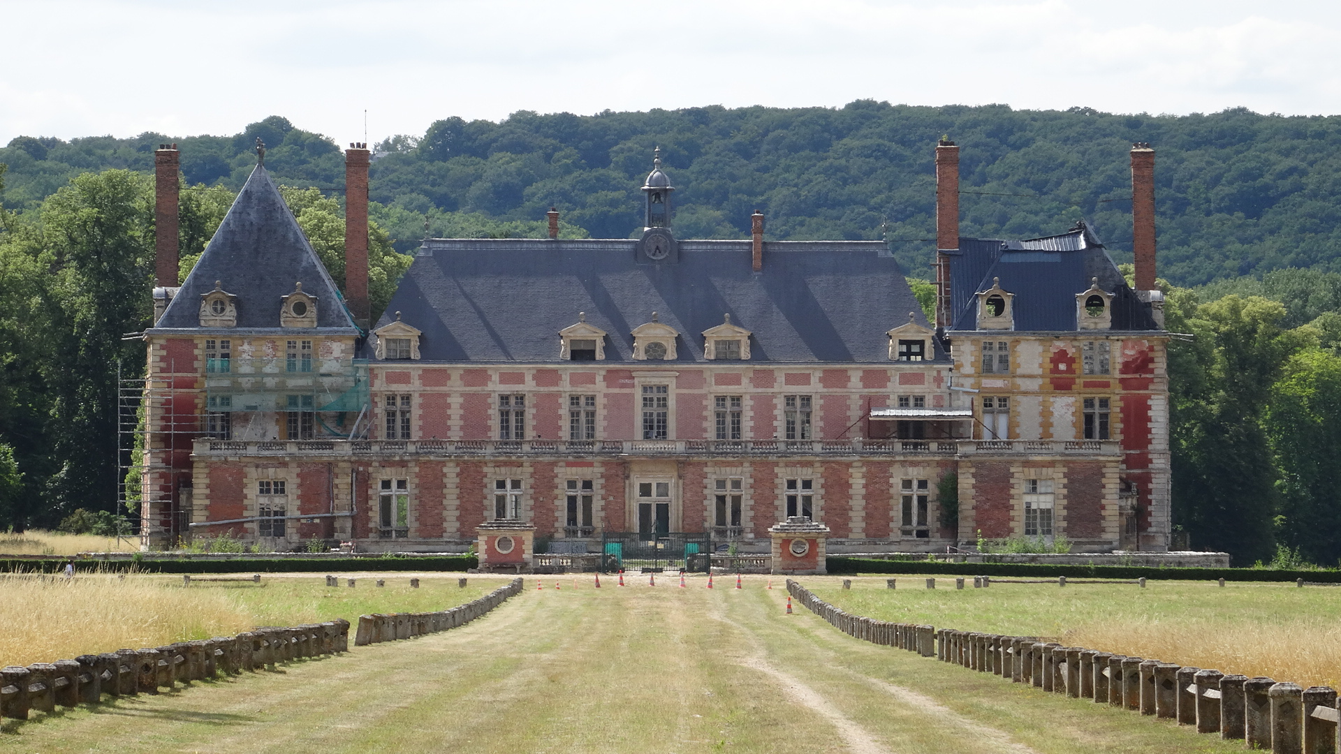 Le château de Rosny-sur-Seine en 2015 (Yvelines, région Île-de-France).